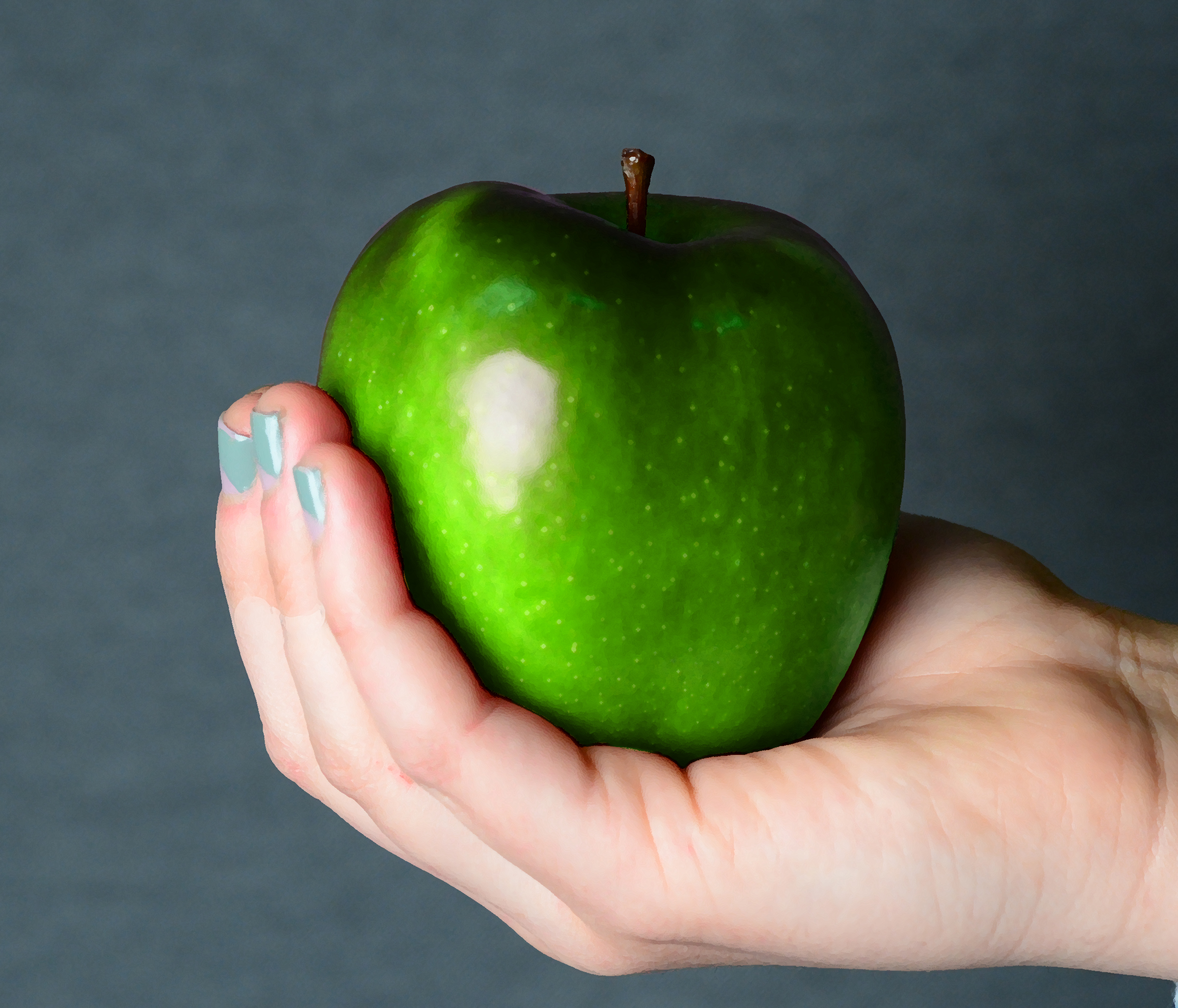 A level piece.